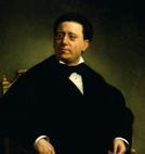 Fotografia del presidente del Congreso Nacional de Chile 1811, Manuel Perez de Cotapos y Guerrero. Manuel Pérez de Cotapos